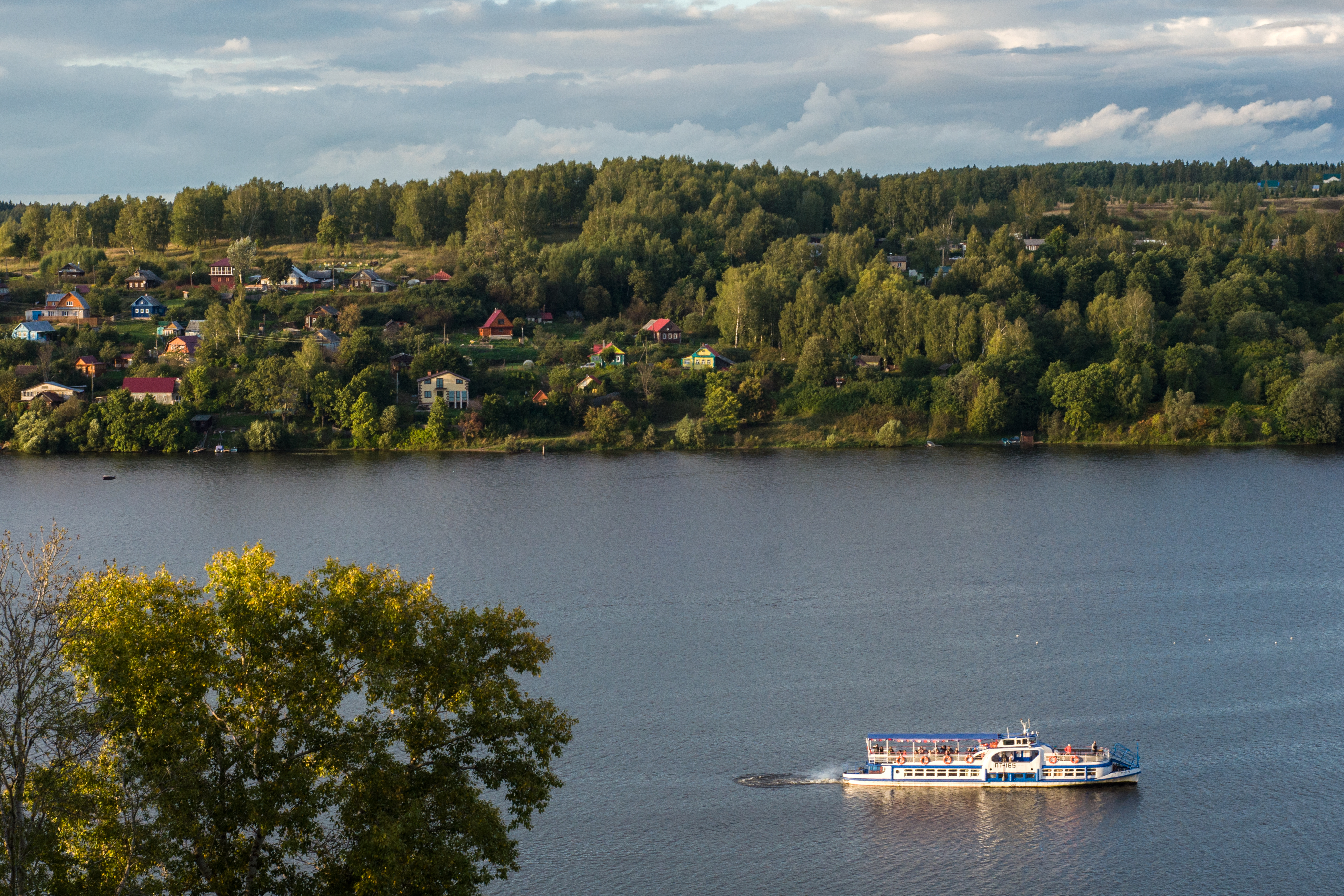 Город Плёс, Приволжский район, Ивановская область. На противоположном берегу Волги - деревня Серково, Красносельский район, Костромская область.